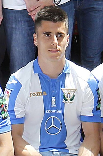 Felicidades pepineros!! Vuestro ascenso a Primera es la historia de un sueño, el resultado de vuestro trabajo y esfuerzo. Sois un orgullo para todo Madrid! Enhorabuena CD Leganés. #LeganésEsDePrimera